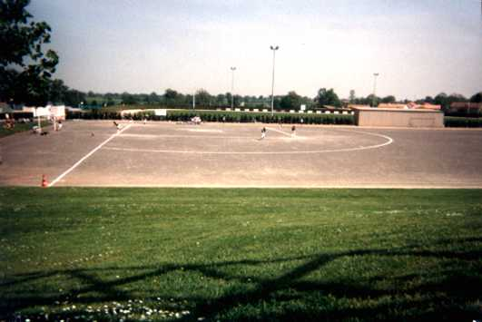 Ancien garochdome